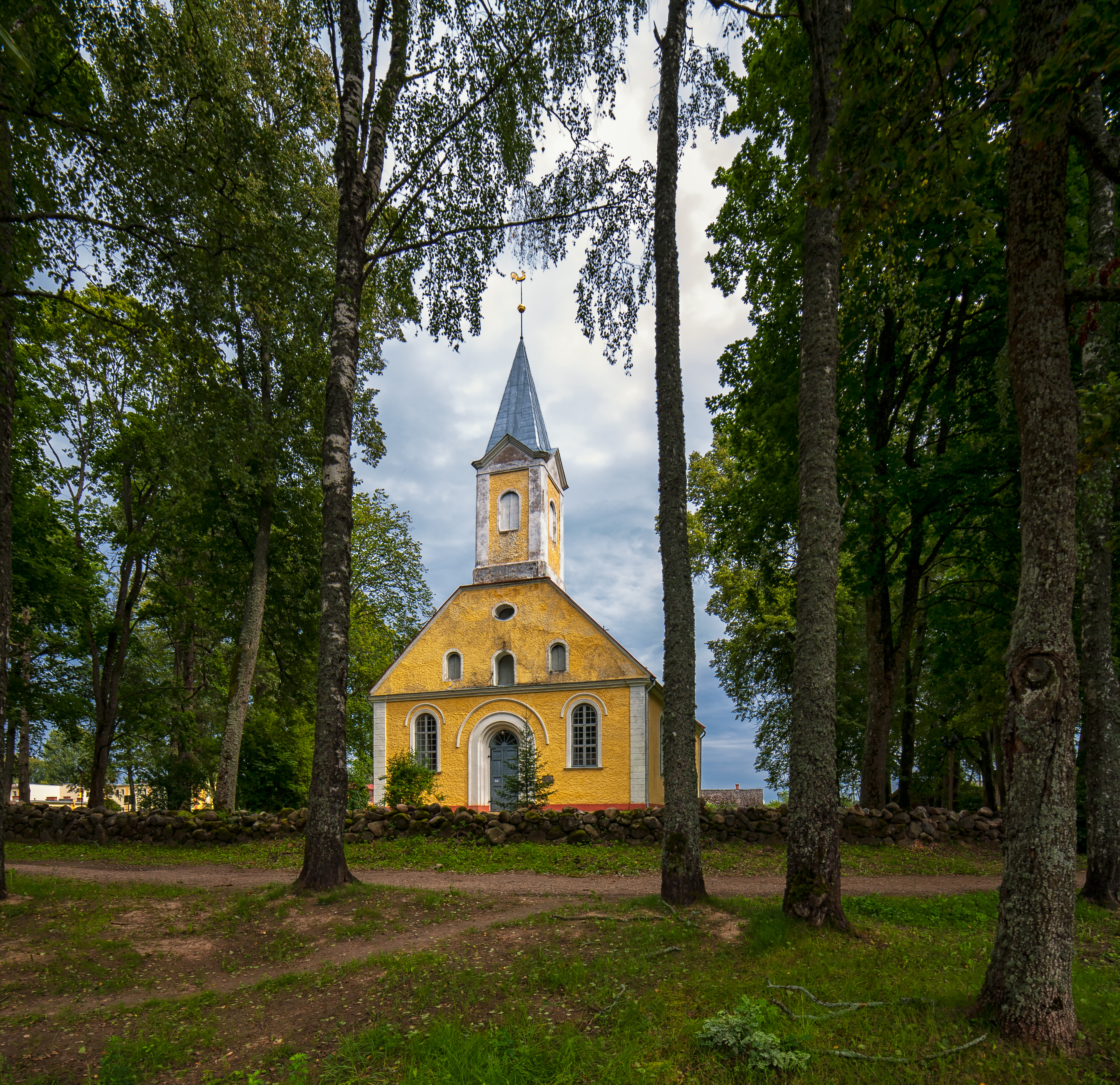 Umurgas luterāņu baznīca ar žogu, Umurga